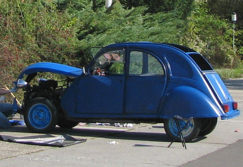 Citroen 2CV die Ente Kotflügel zur Reparatur abschrauben